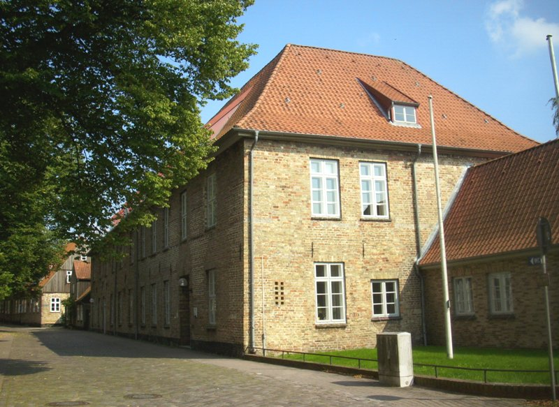 Hattens Gård i Slesvig